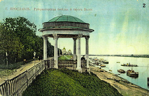 Ярославль. Губернаторская беседка на берегу Волги. 1913-1917.